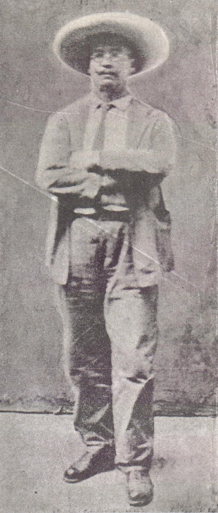 General Ángel Barrios